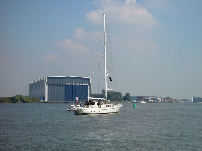 Sailboat Nieuwe Maas